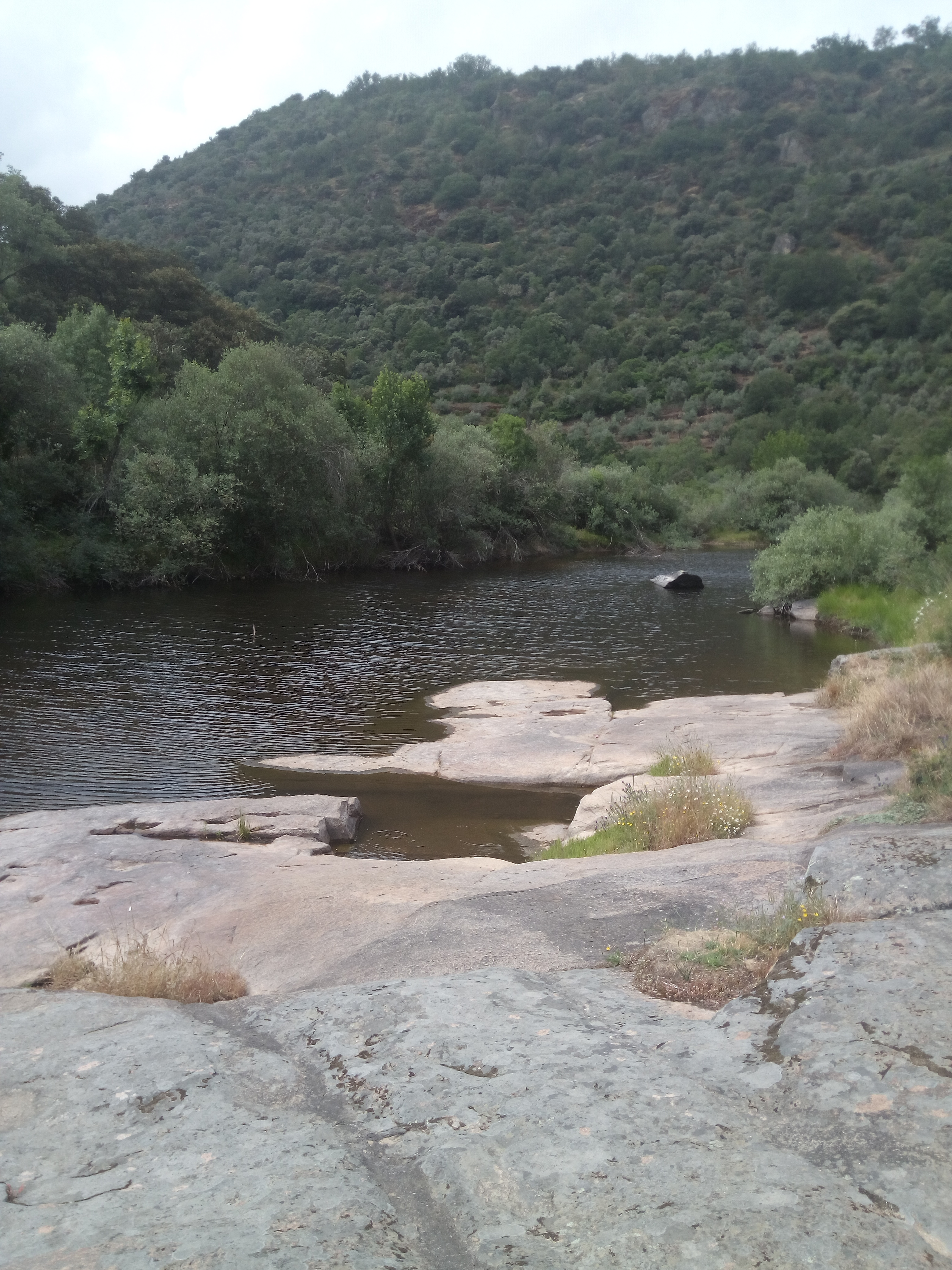 Río de las Uces arriba del Salto del Pozo de los Humos (municipio de Masueco, Salamanca). This is a photography of a Special Area of Conservation in Spain with the ID: ES4150096. Natura2000 entry, EEA entry